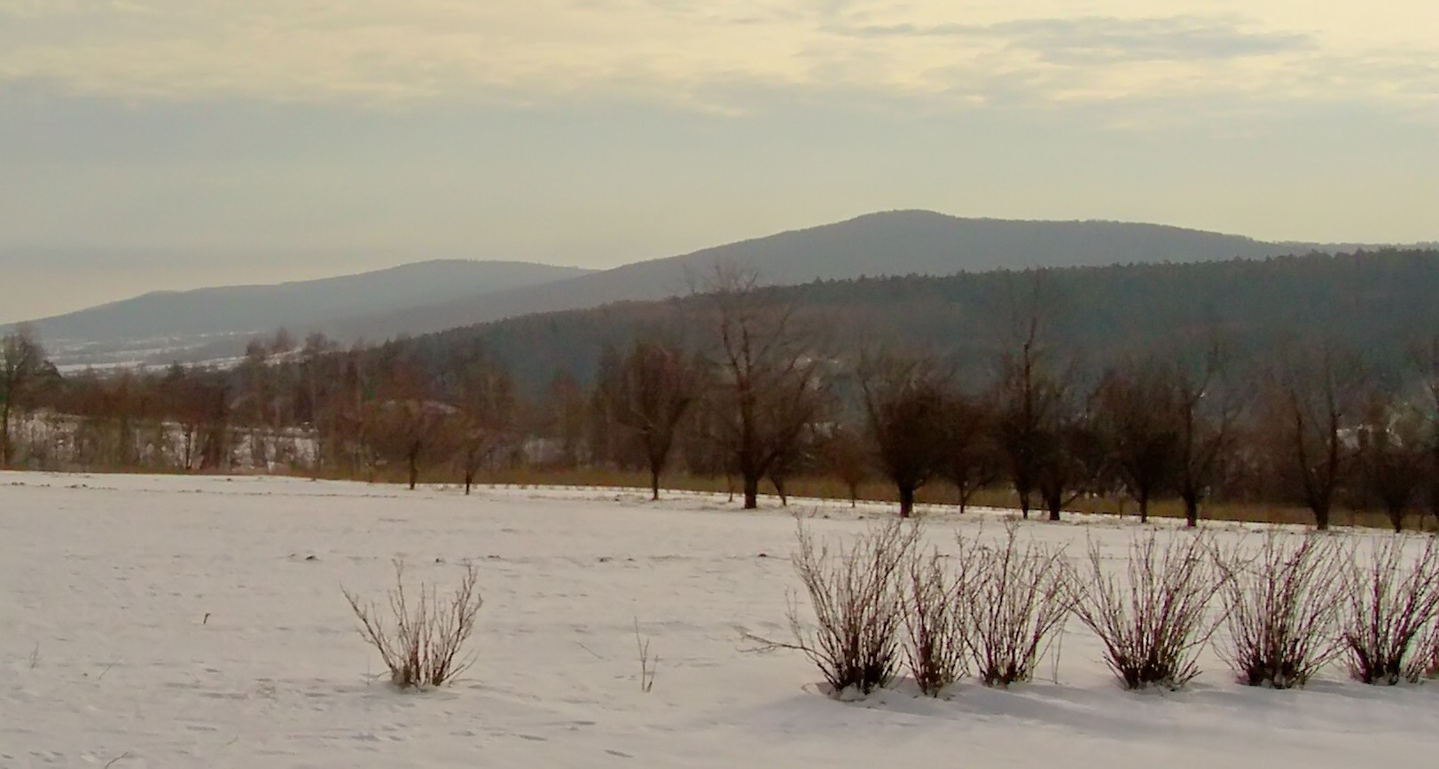 Widok na Pasmo Jeleniowskie